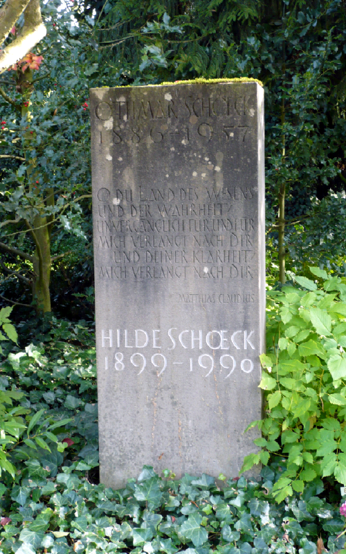 Grabstein von Othmar Schoeck, Friedhof Manegg, Zürich